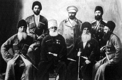 Осетины, участники рус.-тур. войны 1877—1878 гг.